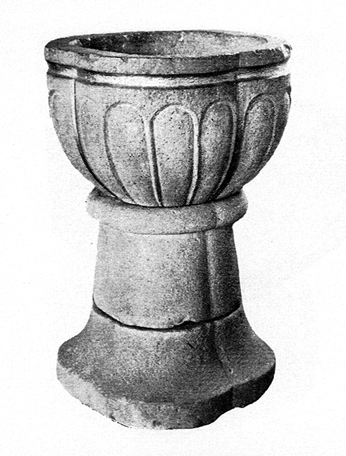 Öxabäcks kyrka. Dopfunt